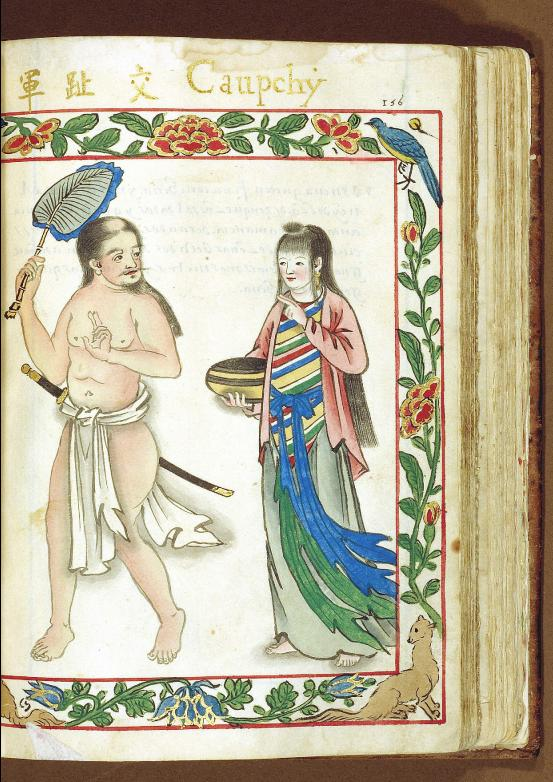 中文（香港）: 越南人服飾